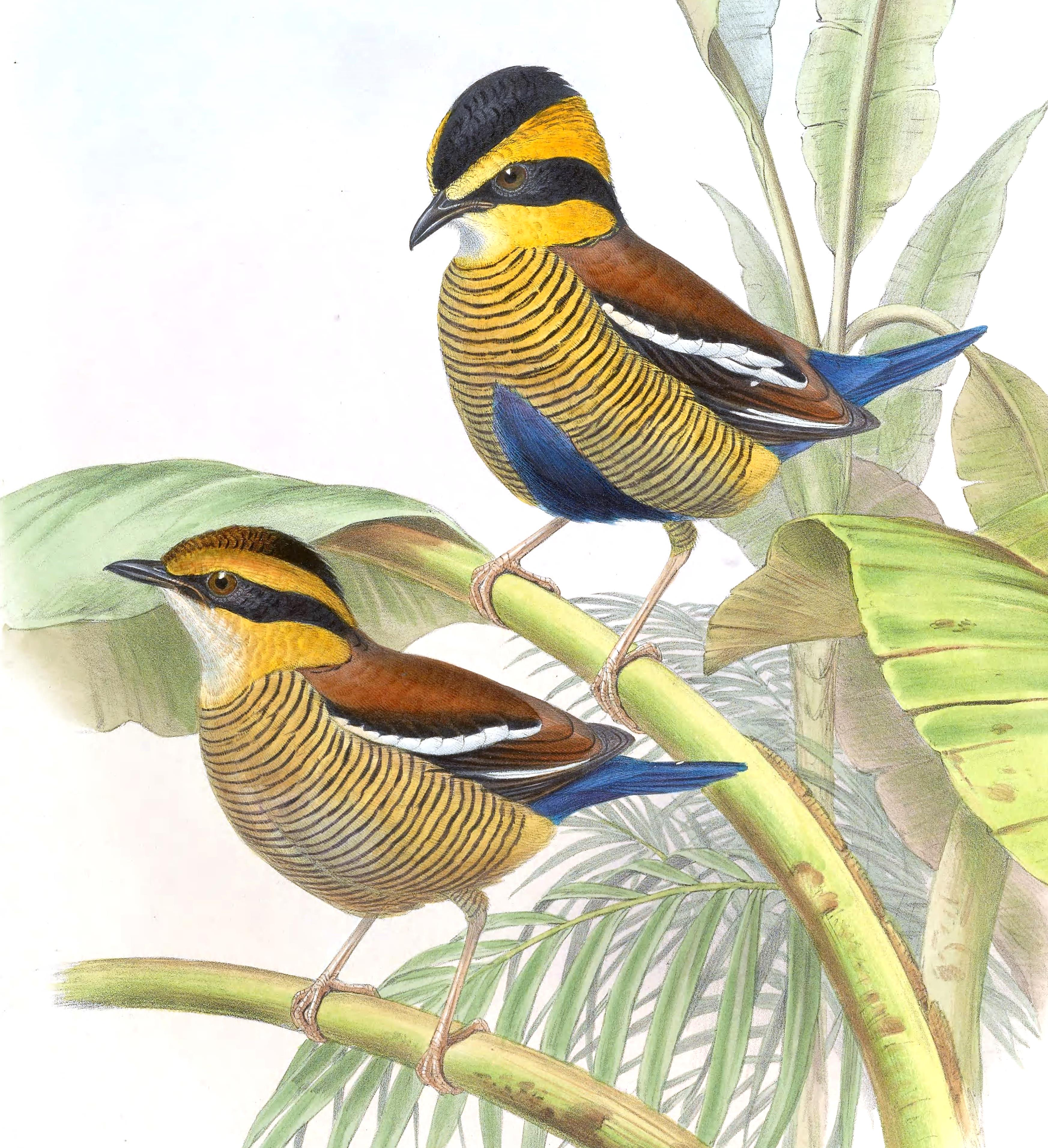 Pitta schwaneri = Hydrornis schwaneri[1]